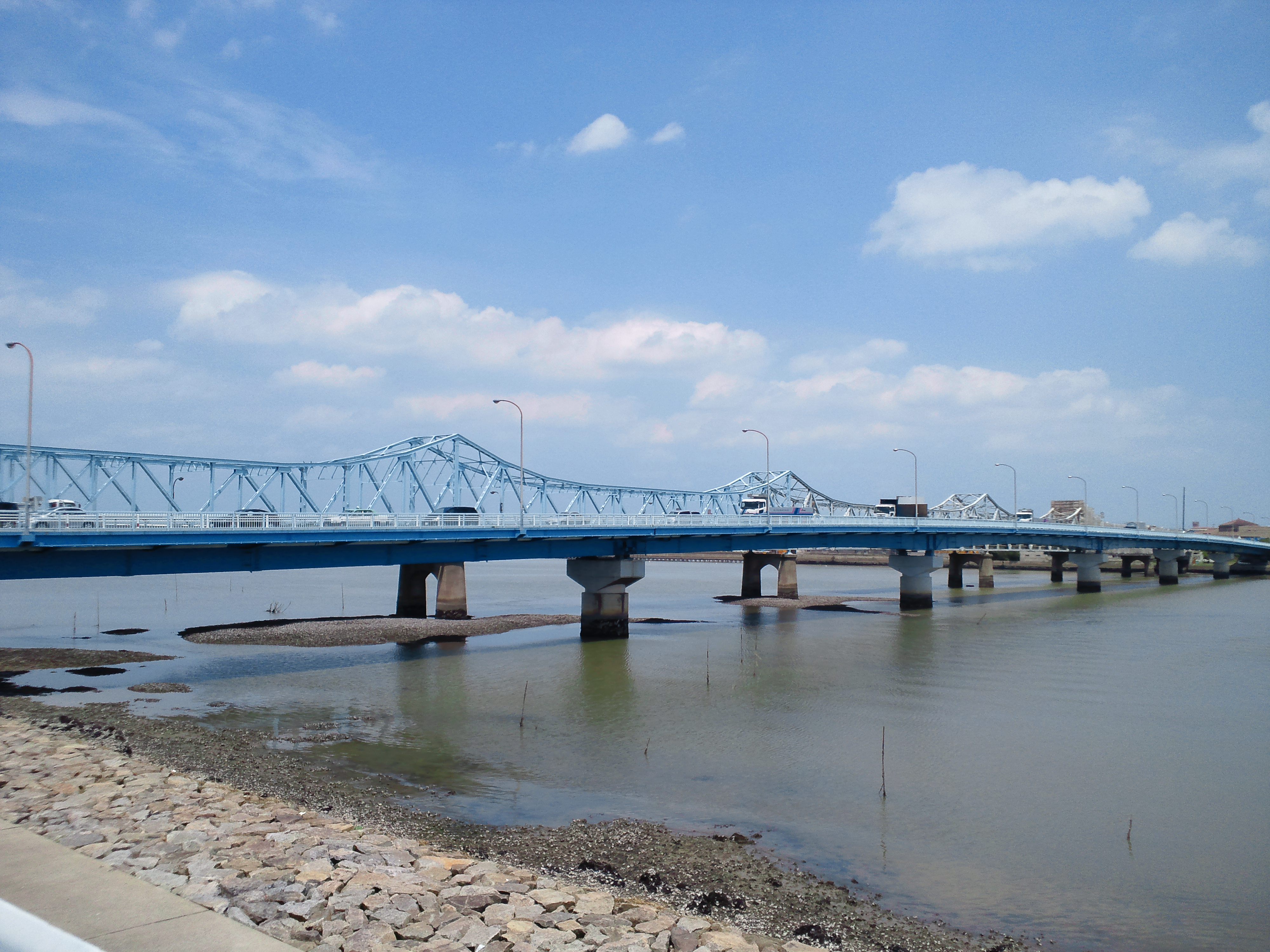 国道247号衣浦大橋を半田市側より撮影。